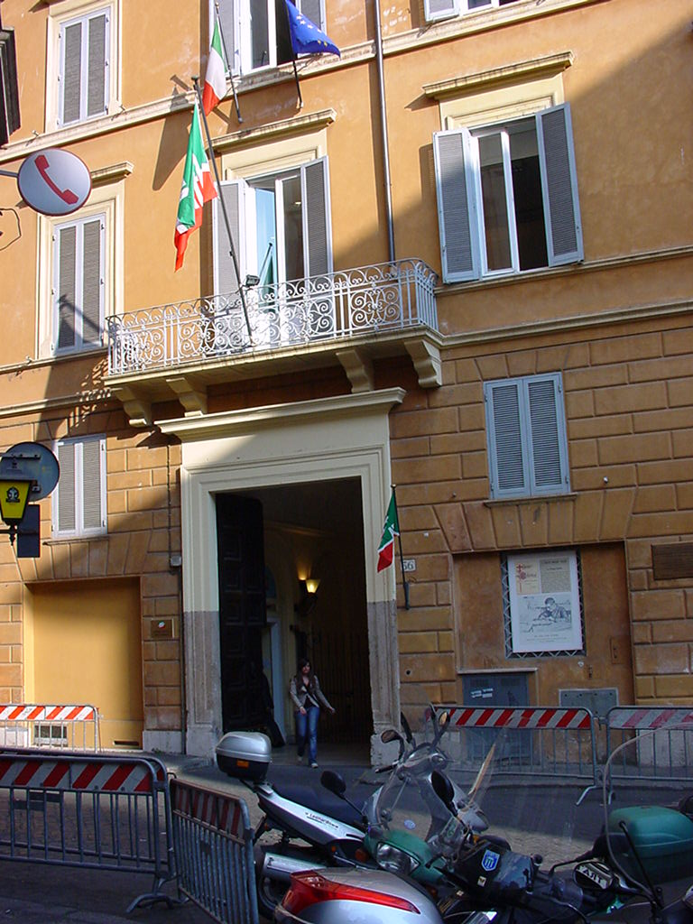 Vecchia sede nazionale Forza Italia a Roma, Via dell'umiltà. autore utente:DracoRoboter Self made